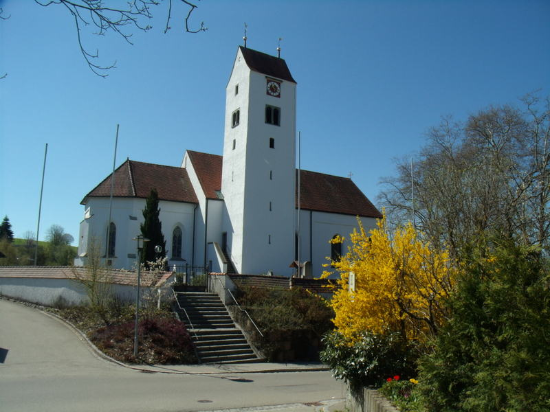 Weißensberg